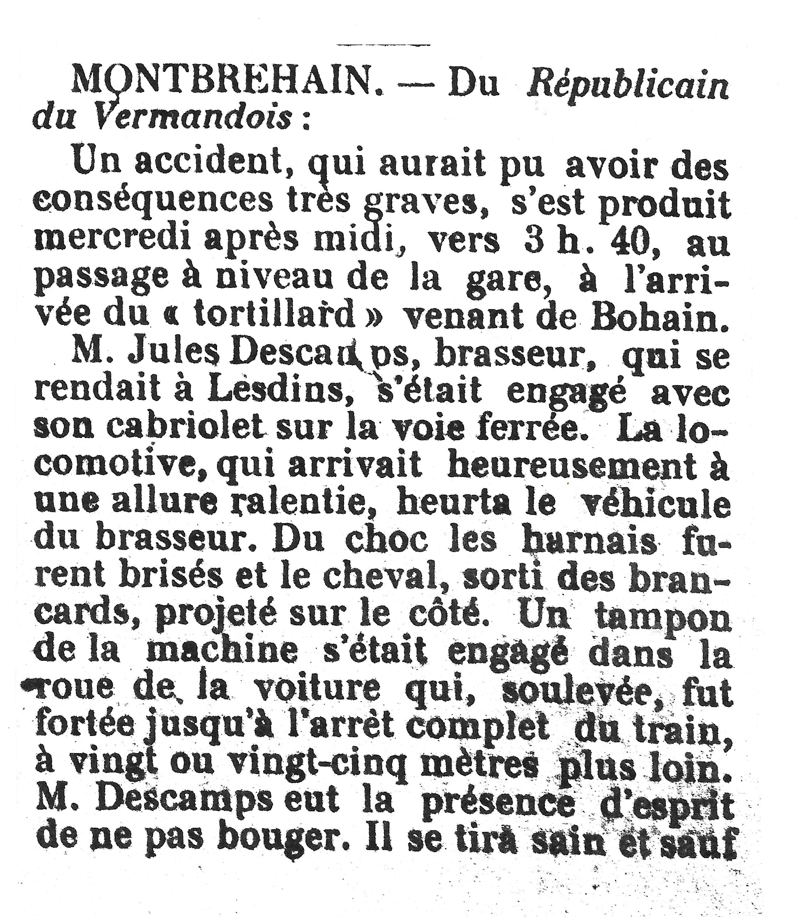 Article de journal de 1902.